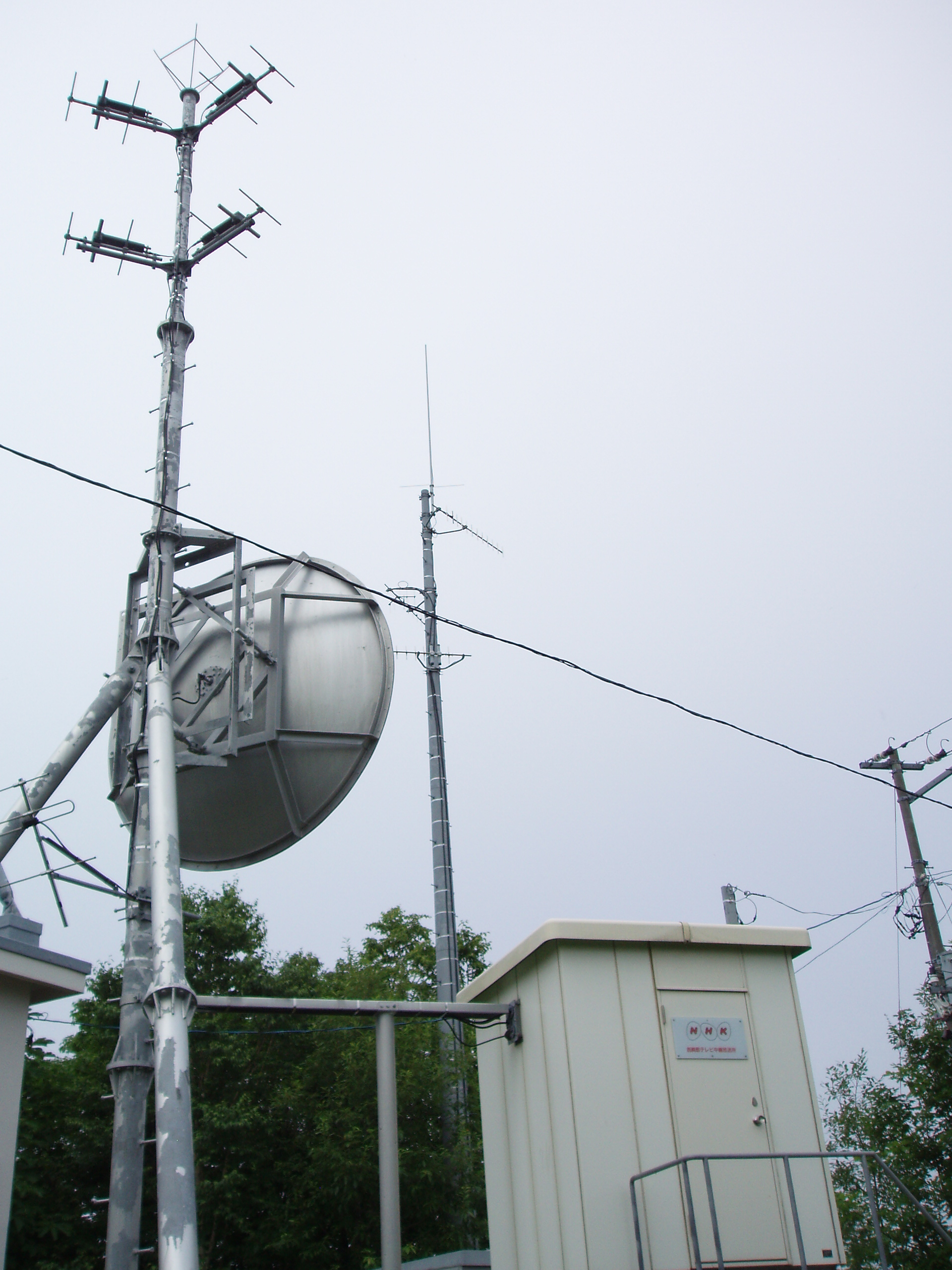 西興部中継局 NHK送信設備